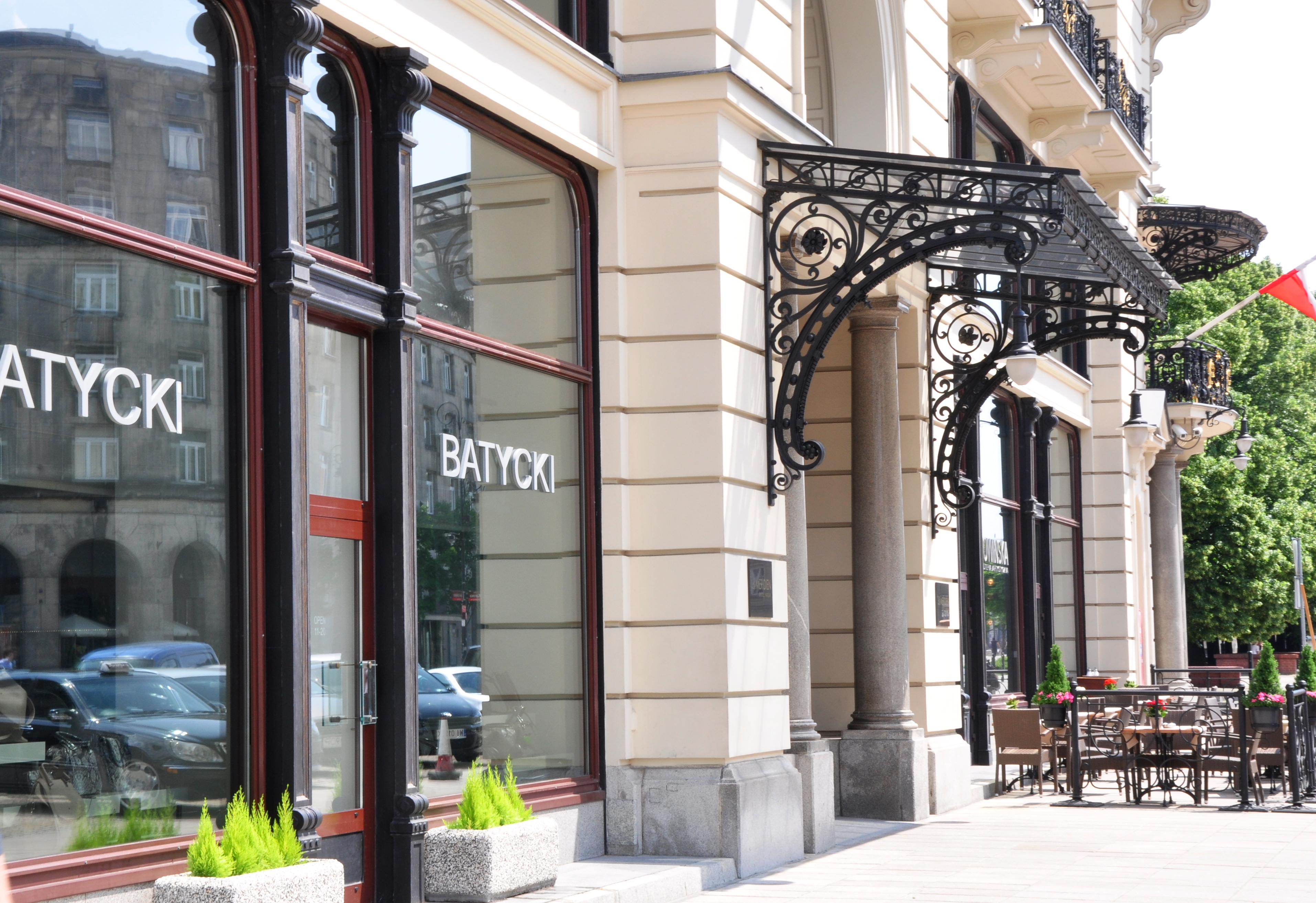 Hotel Bristol, Warschau.